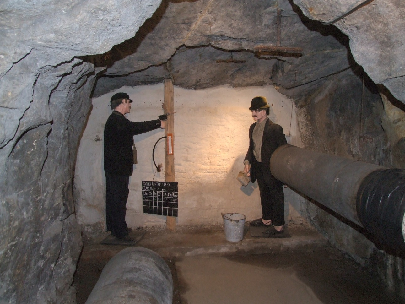 Subterranean skansen Guido in Zabrze - underground